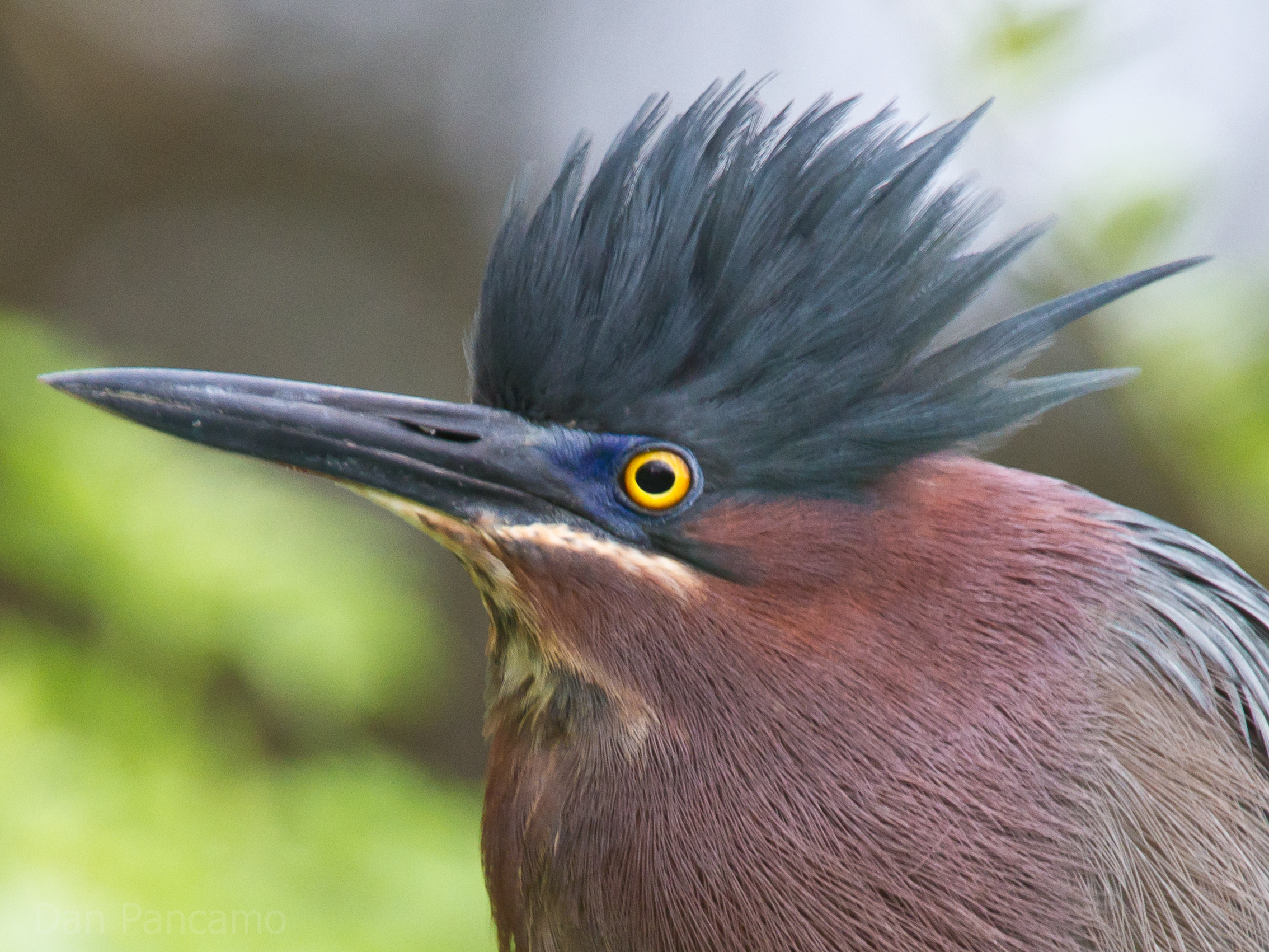 Green Heron